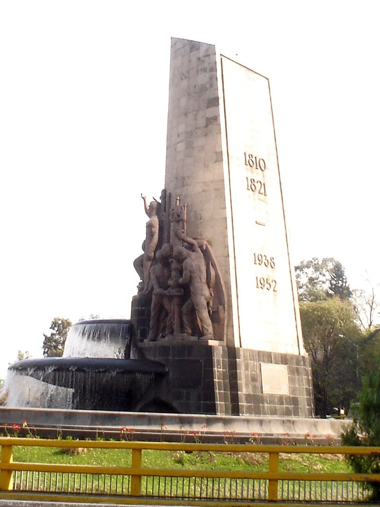 Fuente de Petróleos Mexicanos, en Paseo de la Reforma y Anillo Periférico, Col. Lomas de Chapultepec, delegación Miguel Hidalgo de la Ciudad de México, D.F., México.